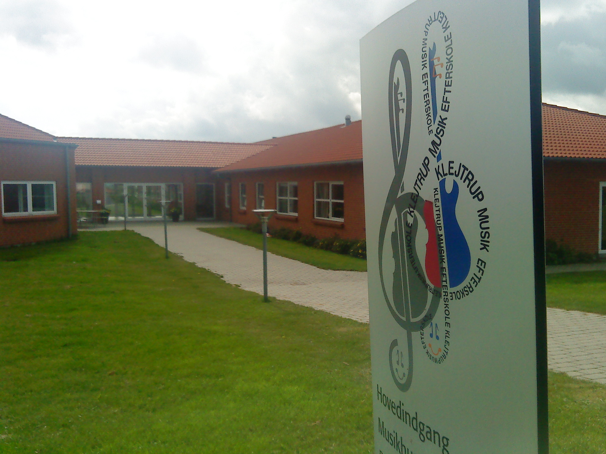 indgangen til Klejtrup musikefterskole